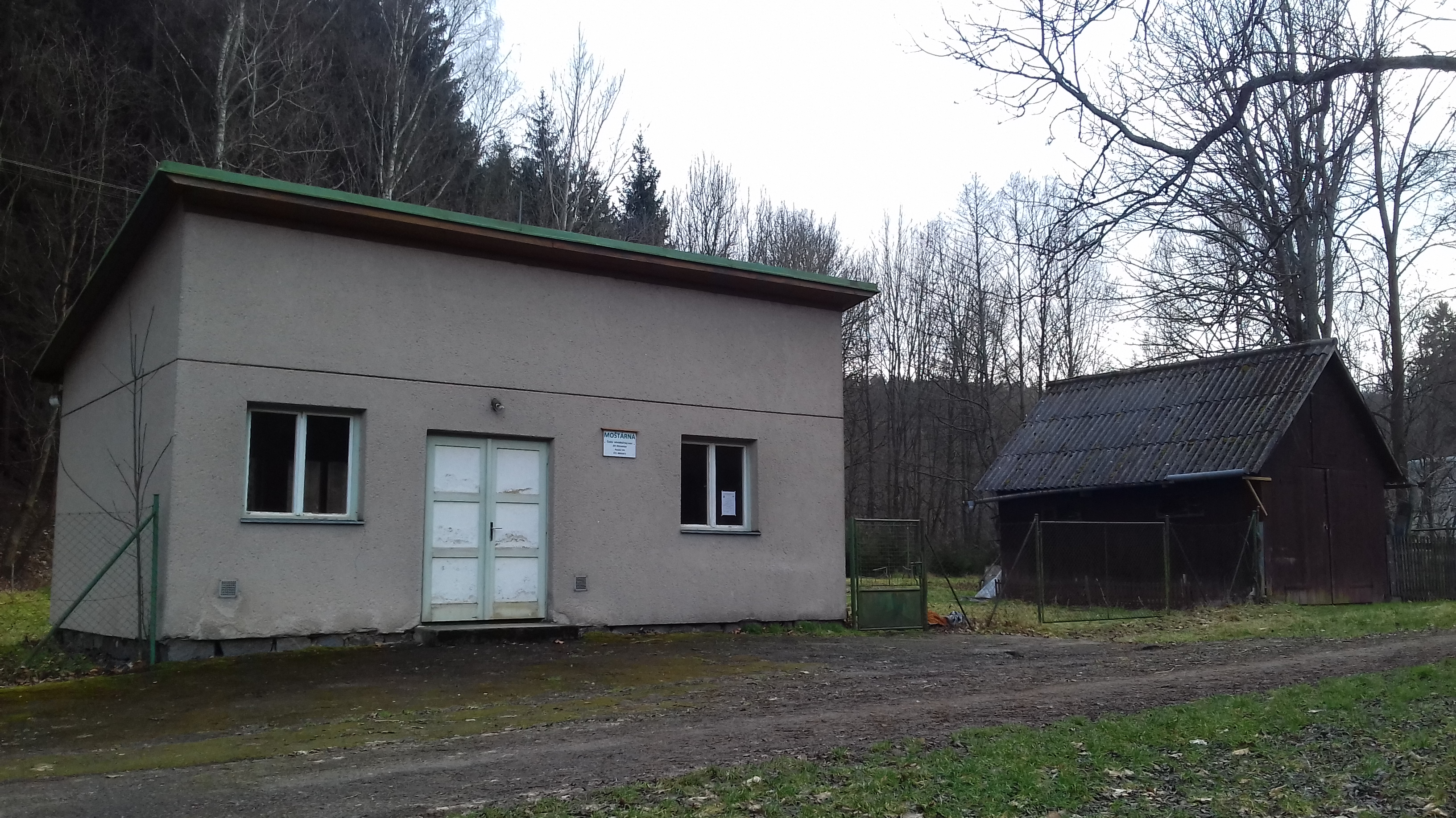 budova moštárny v Jimramově, Panská čp. 320.